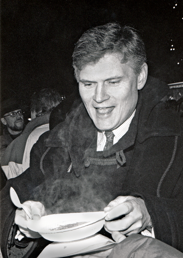 Joakim Ollén åt ärtsoppa på Stortorget i Malmö och väntade på regeringens klartecken för bygget av Öresundsbron. Moderaterna stod för "kalaset" och alla som ville lät sig väl smaka. Radion stod på och alla lyssnade, men regeringen fattade inget beslut den kvällen 1991.